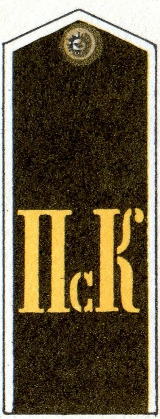 Погоны Псковских кадетов